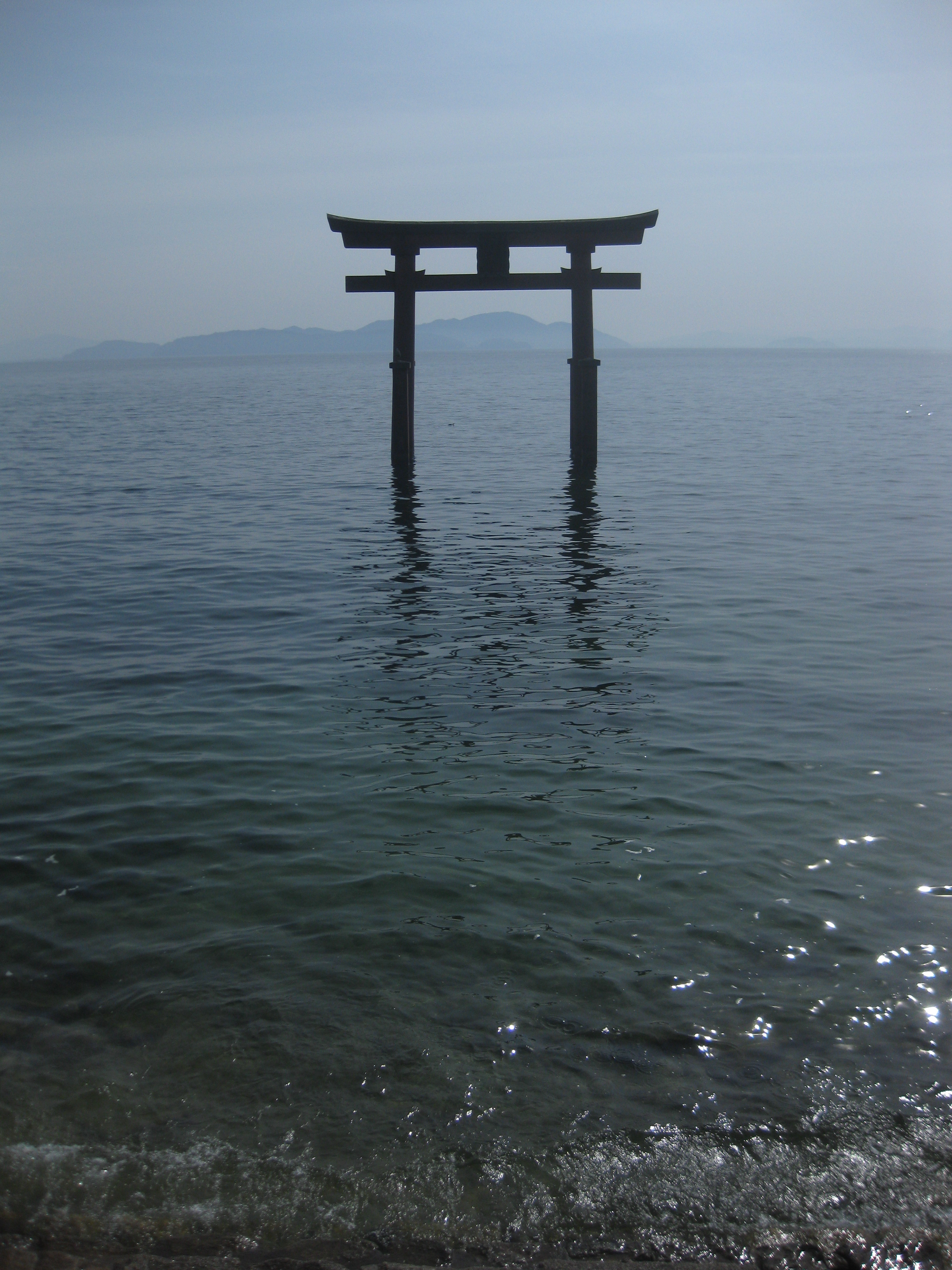 滋賀県高島市鵜川の白鬚神社の鳥居と琵琶湖